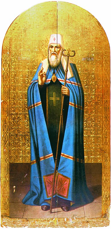 Свт. Иоанн (Максимович), митр. Тобольский и всея Сибири. Икона. Ок. 1916 г. (Курганский обл. художественный музей)